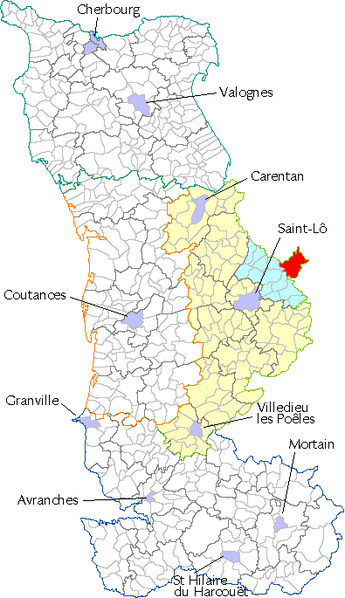 Situation de Cerisy-la-Forêt dans la Manche.